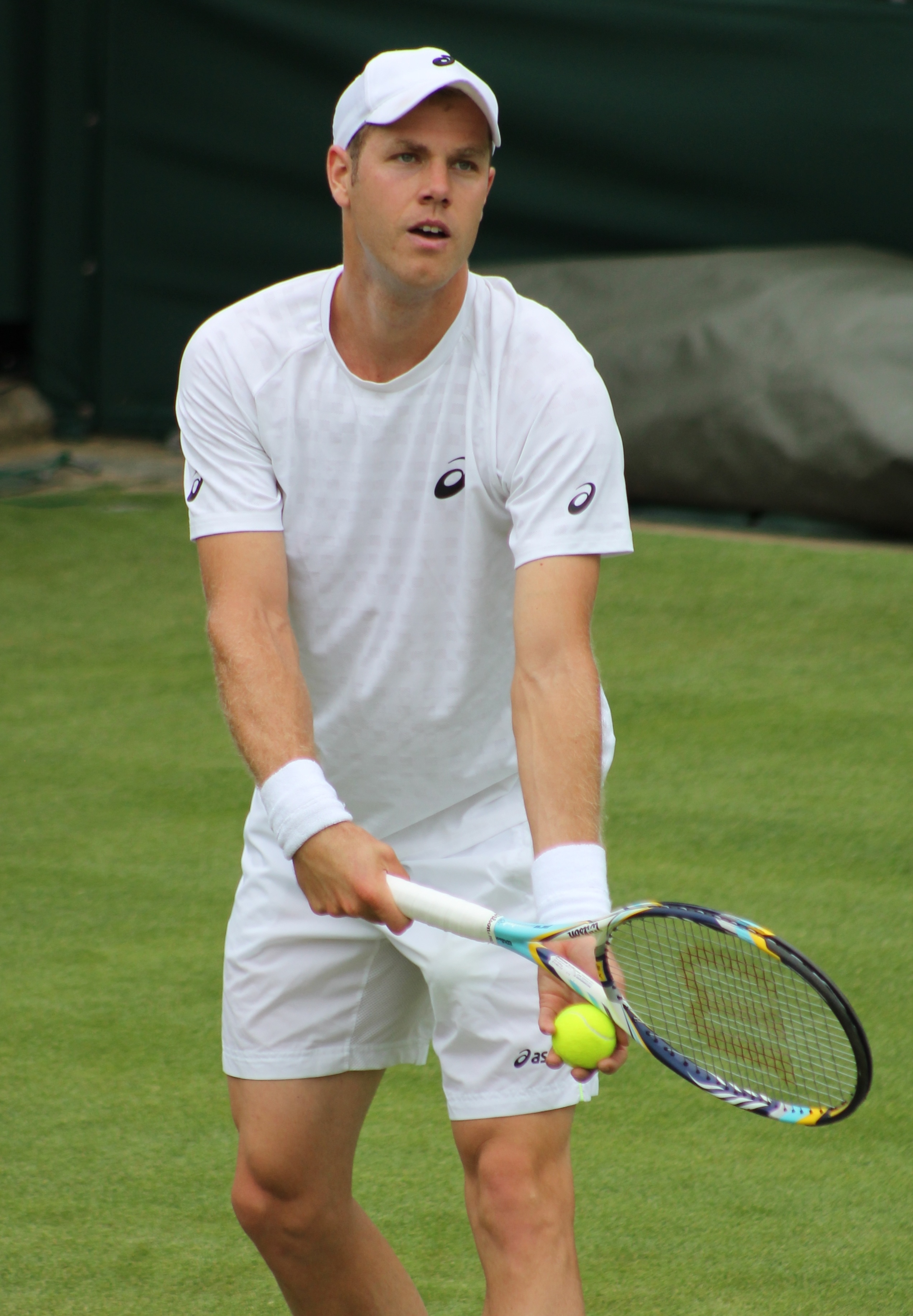 Reister WM13-010